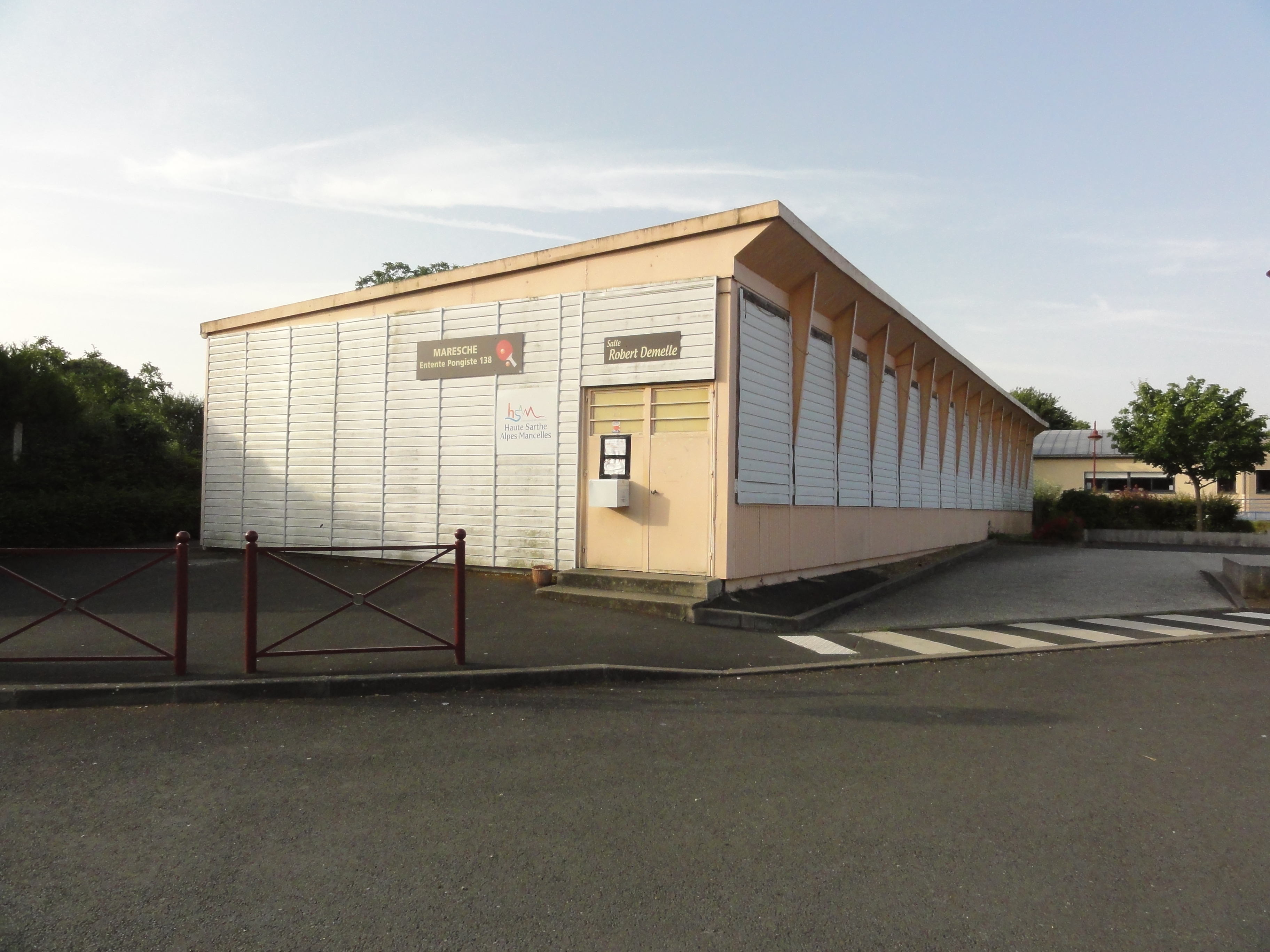 Maresché (Sarthe) salle Robert Demelle, salle du club de ping-pong.